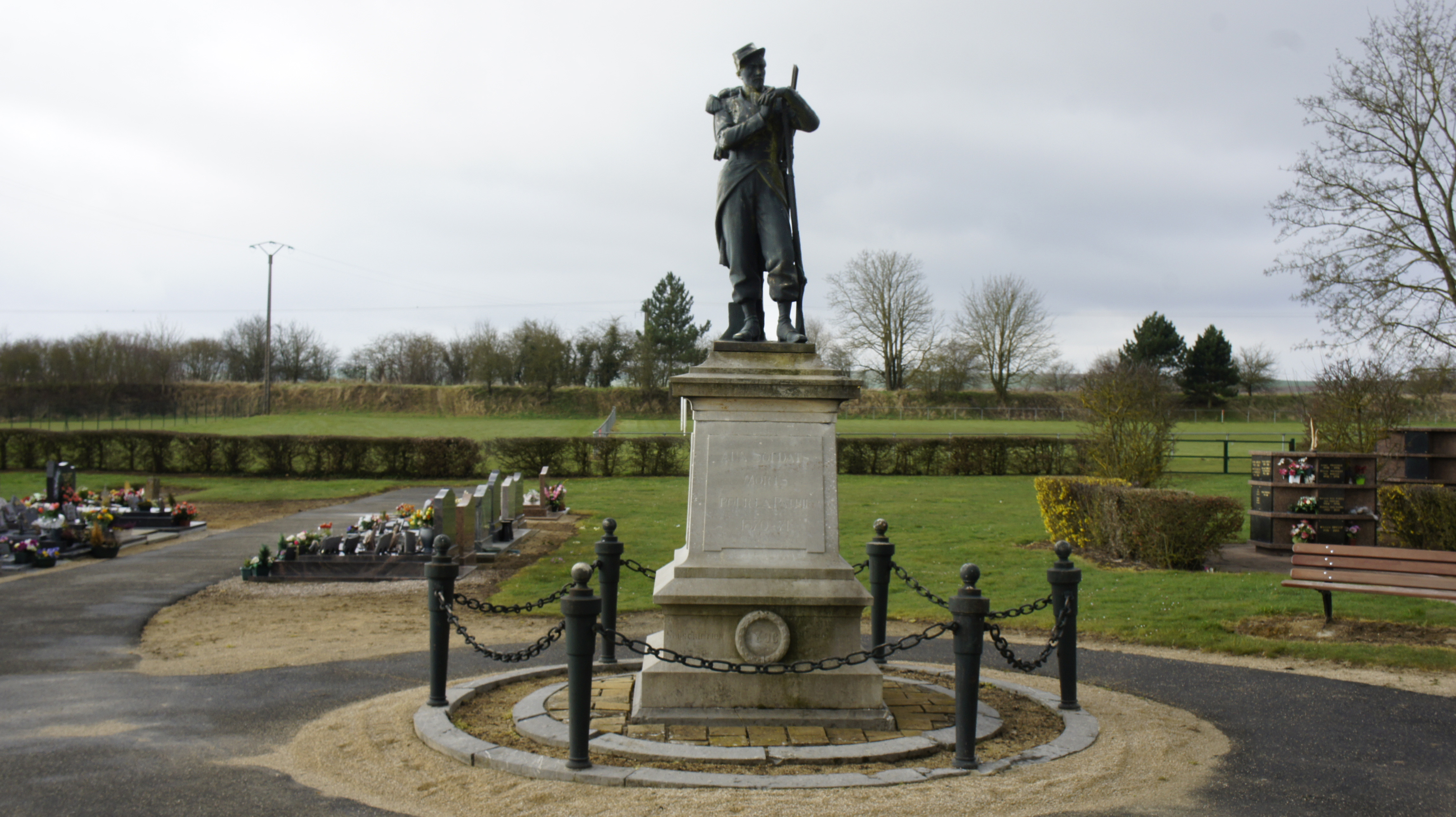 Pontfaverger, monument aux morts de_1870_monument_dans le cimetière .